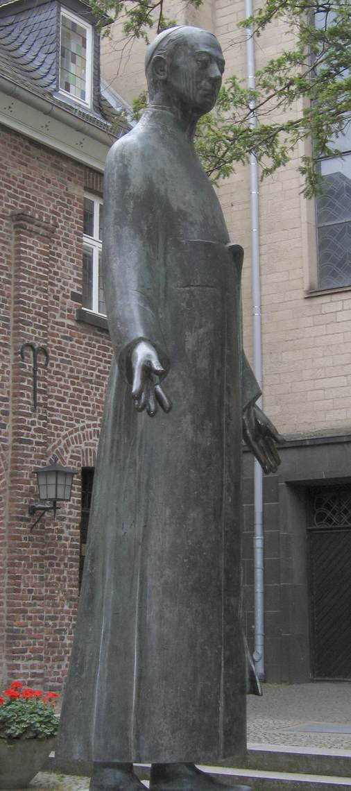 Bronzedenkmal Adolph Kolping in Kerpen vor St. Martinus, das der Düsseldorfer Bildhauer Kurt Zimmermann (1910–1961) im Jahr 1959 schuf